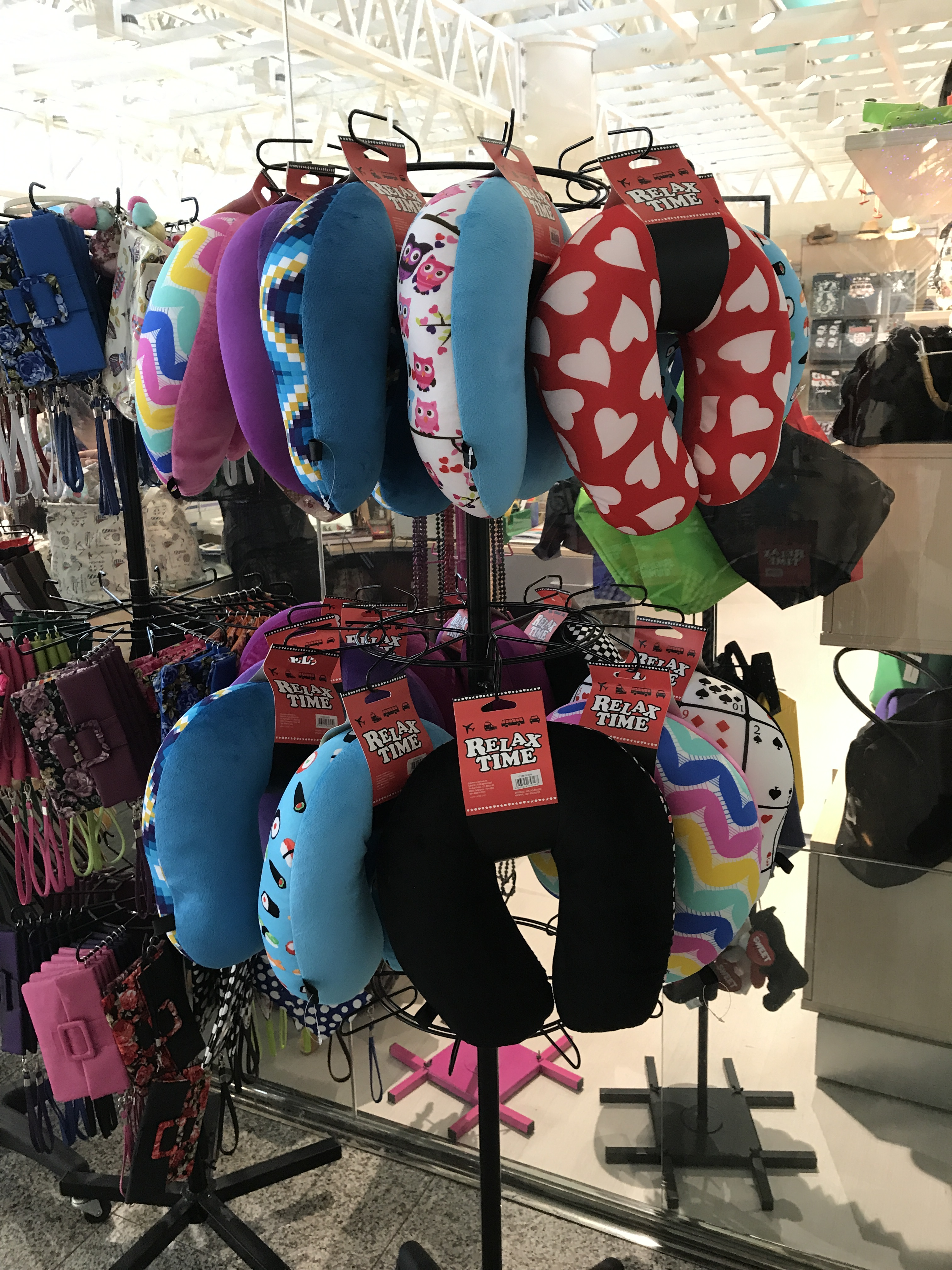 Aéroport Olbia : coussins de voyages en vente.